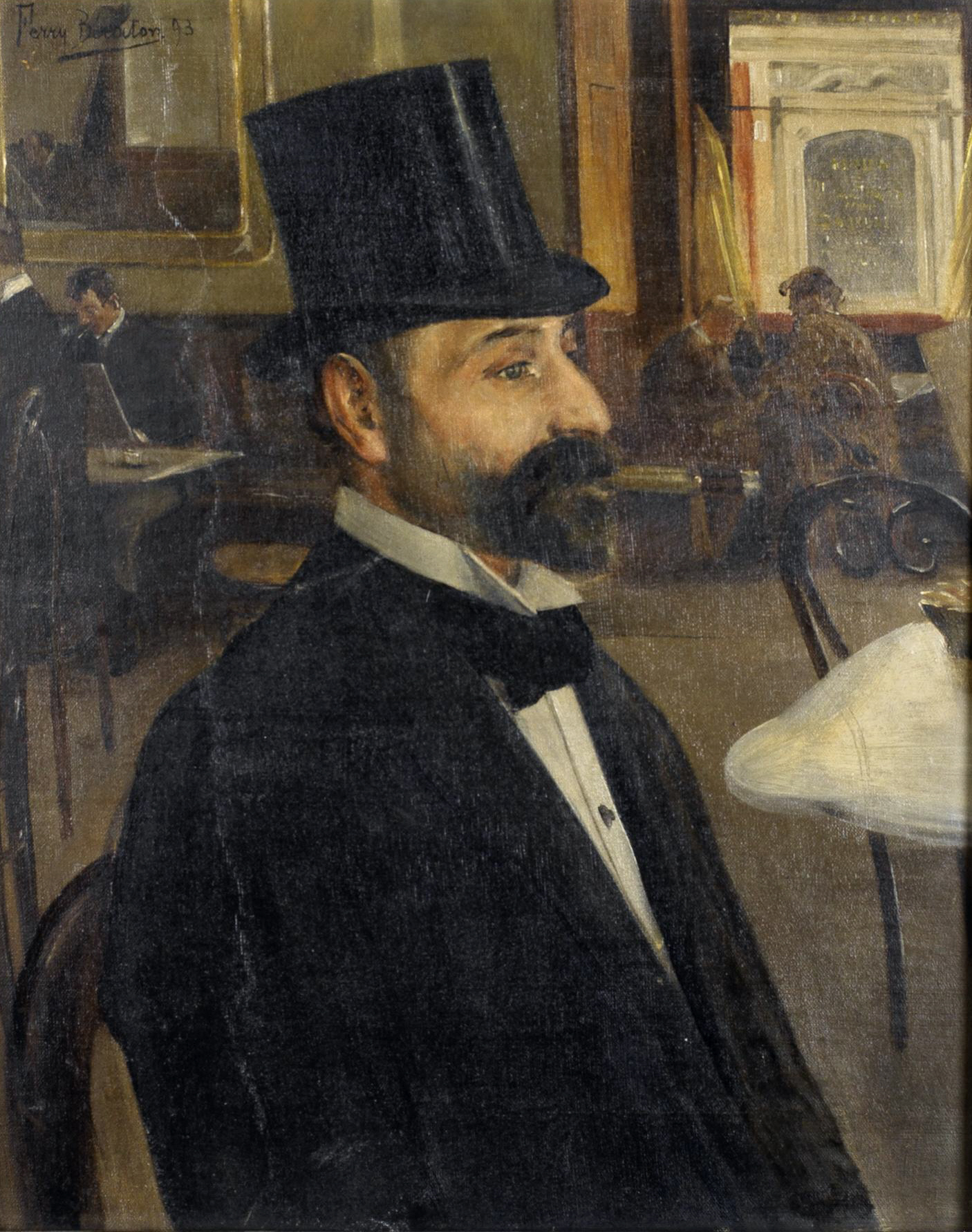 Henry Toulouse Lautrec in einem Pariser Cafe.title QS:P1476,de:"Henry Toulouse Lautrec in einem Pariser Cafe." label QS:Lde,"Henry Toulouse Lautrec in einem Pariser Cafe."